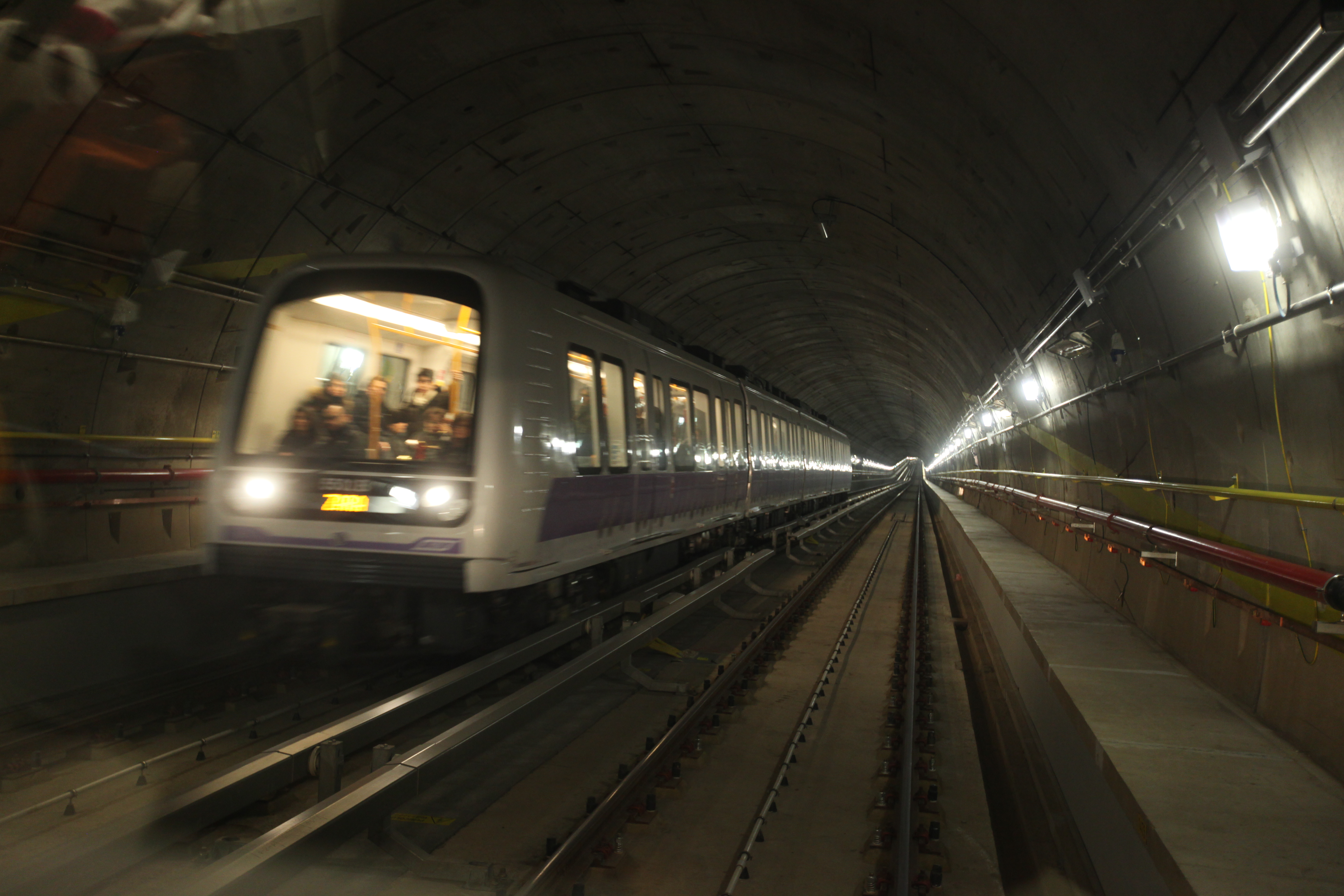 La nuova M5, la Lilla a Milano